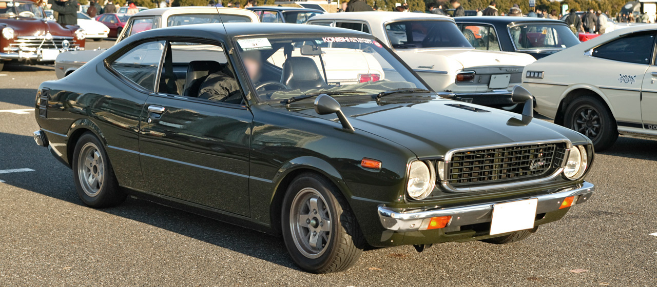 Toyota Corolla 2 door Hardtop 1600 Levin ( TE37 )